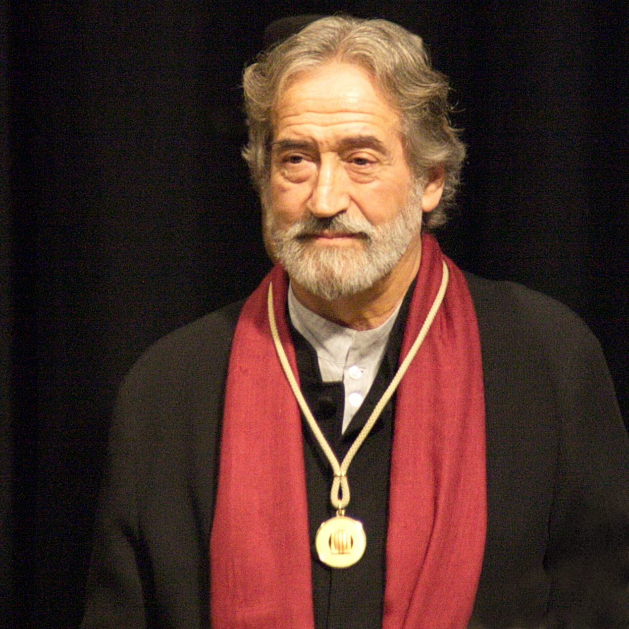 Acte de lliurament de la Medalla d'Or de la Generalitat de Catalunya a Jordi Savall. Barcelona, 17-10-2014